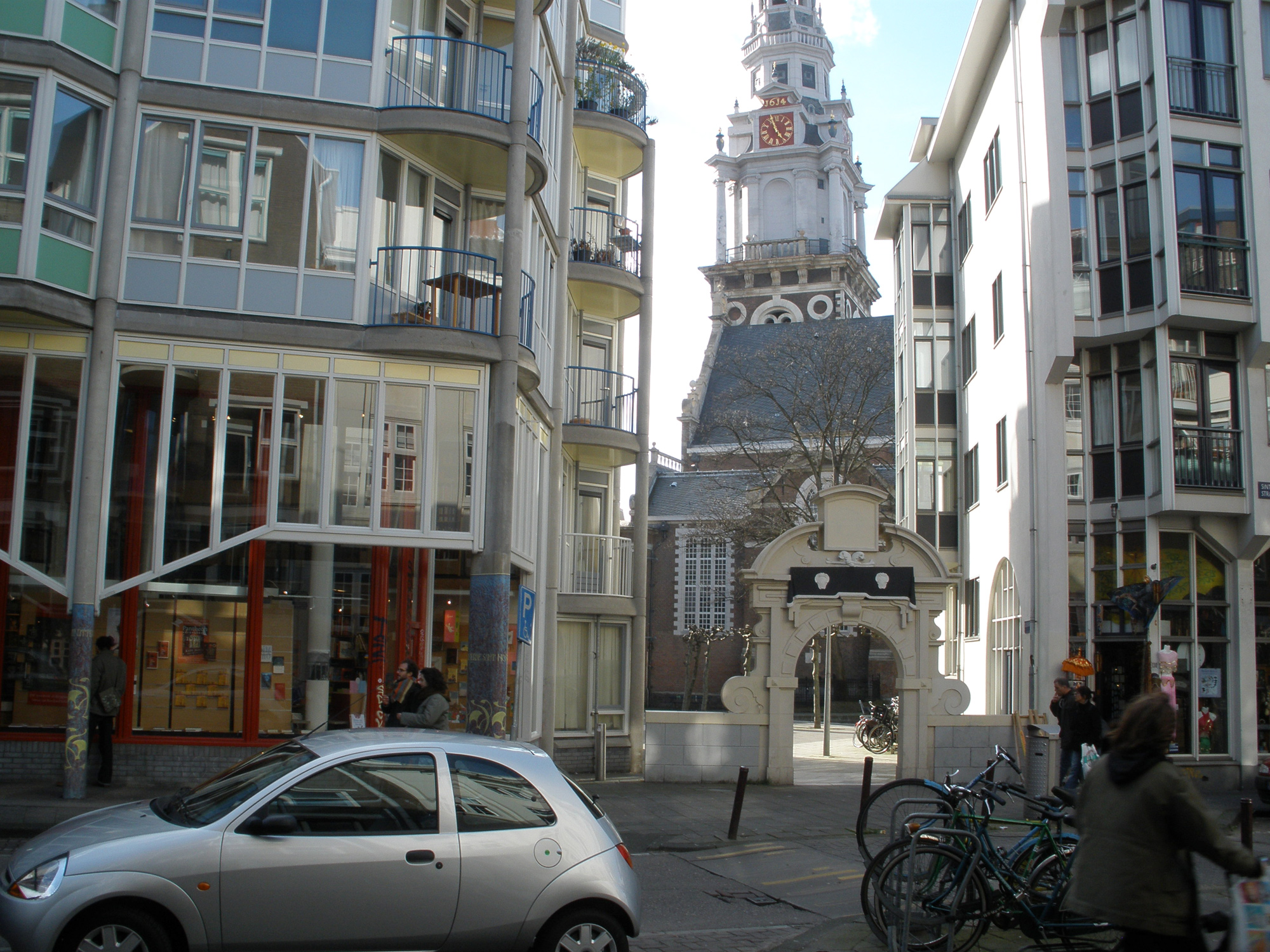 Sint Antoniesbreestraat, Amsterdam, looking towards the Zuiderkerk church and Zuiderkerkhof churchyard